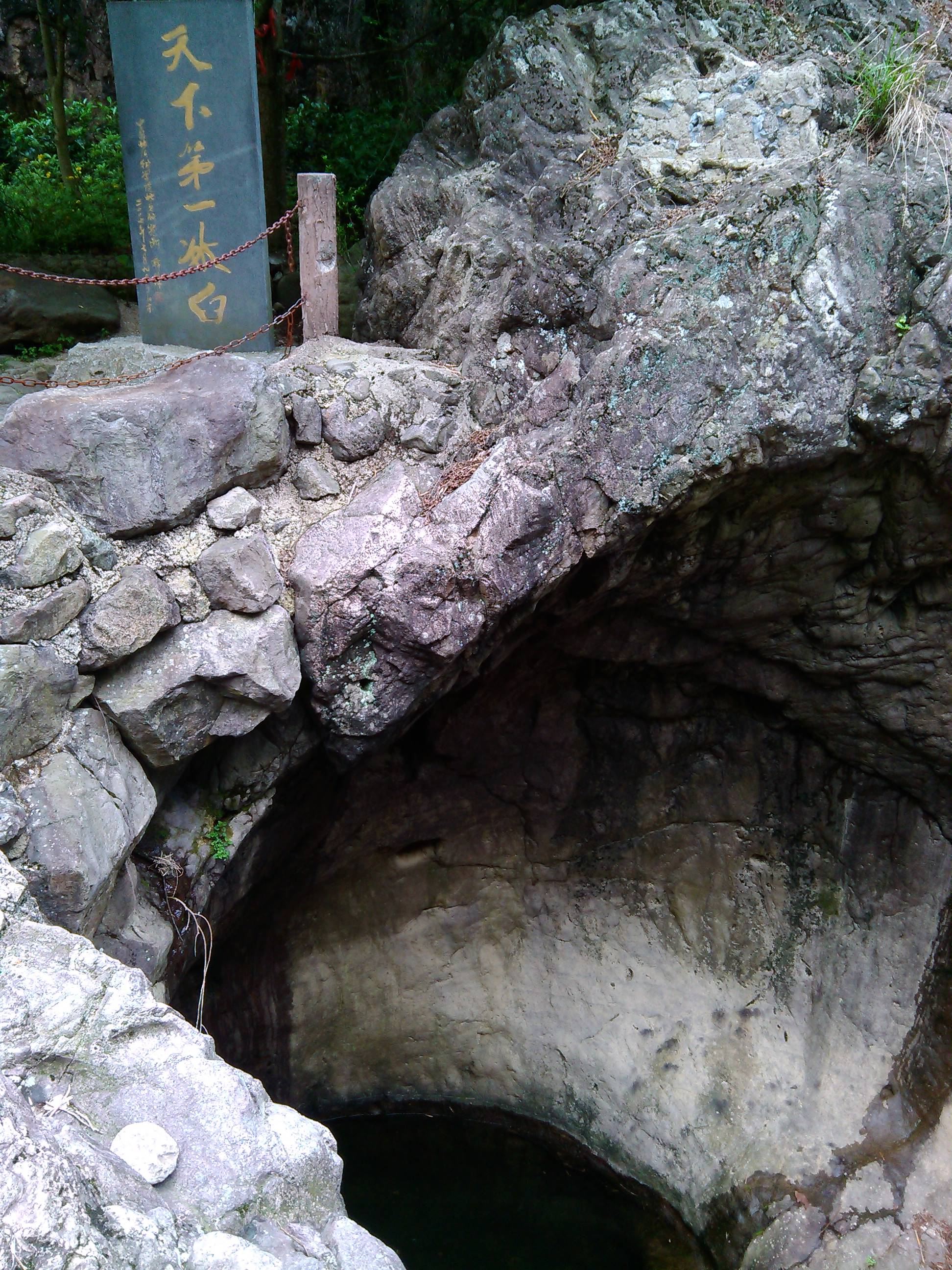 Pan'an, Jinhua, Zhejiang, China